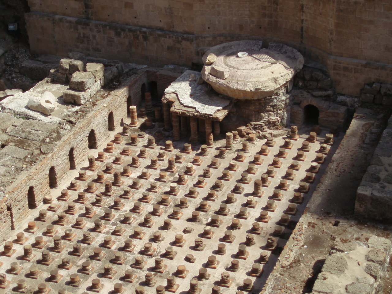 Roman bath Beirut lebanon 025